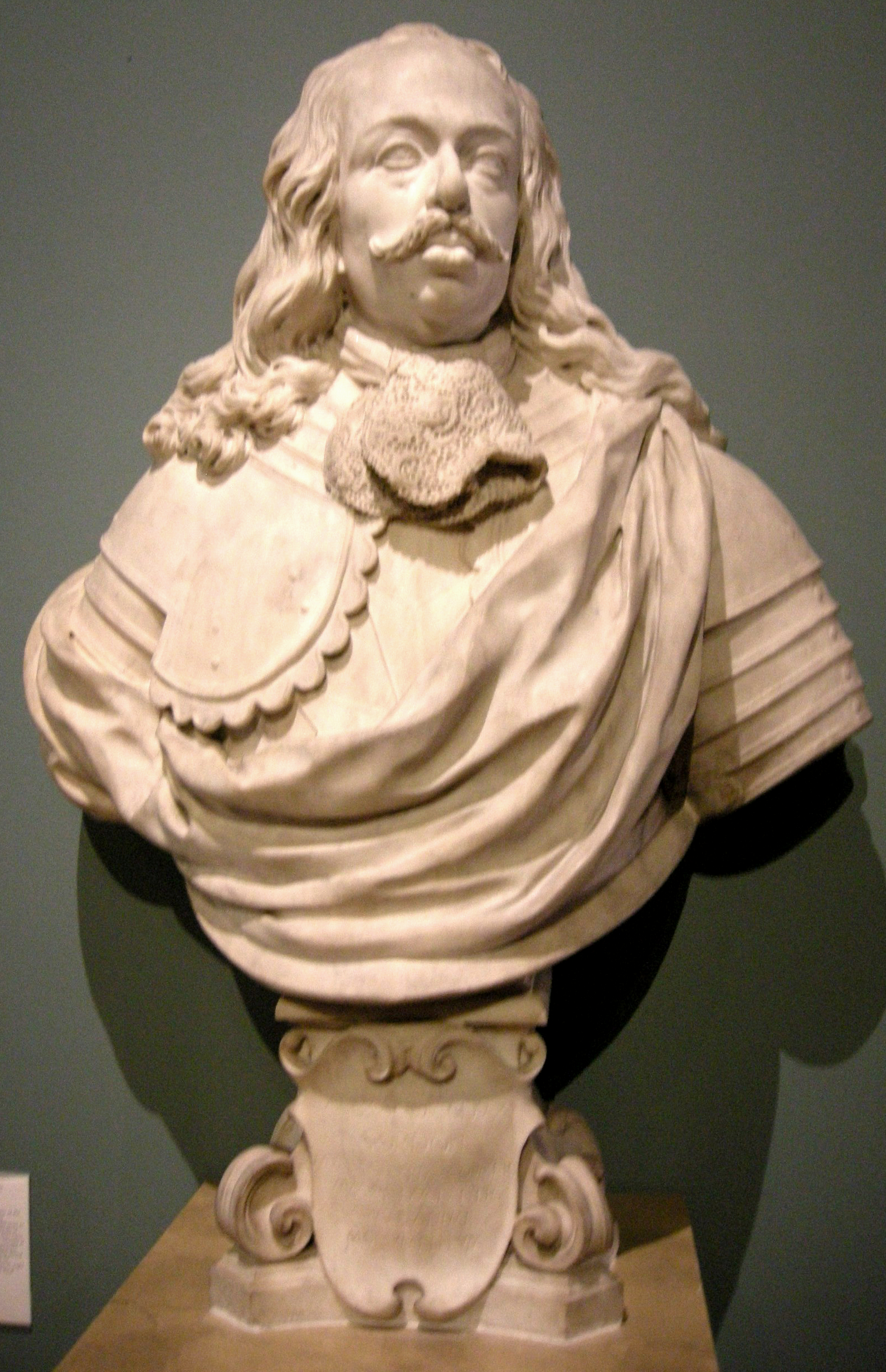 Giovanni battista foggini, busto di cosimo III de' medici, 1717-18